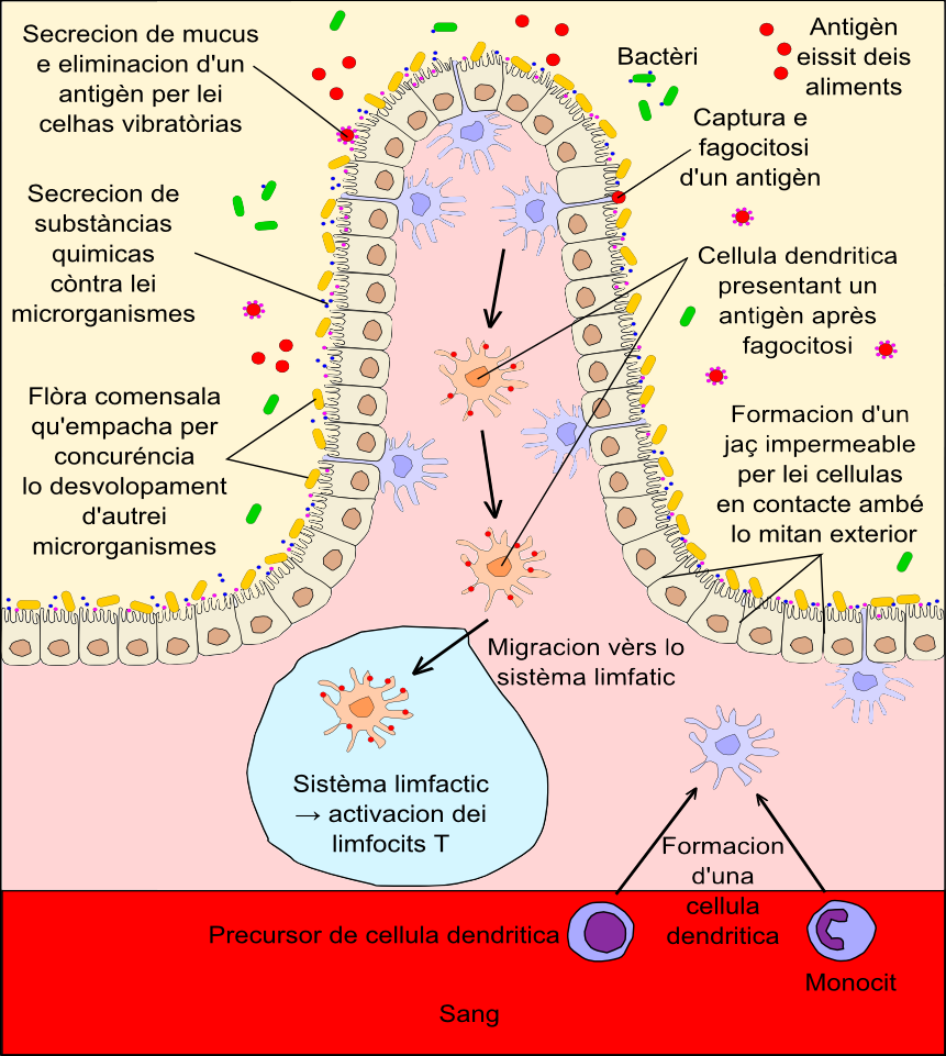 Esquèma simplificat dau foncionament d'una barriera fisica (exemple de l'intestin uman).